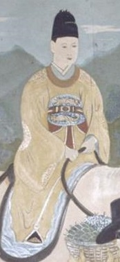 단종 어진(강원도 영월군 영월읍 영흥리 영모전에 있는 1927년 이규진의 이모본)